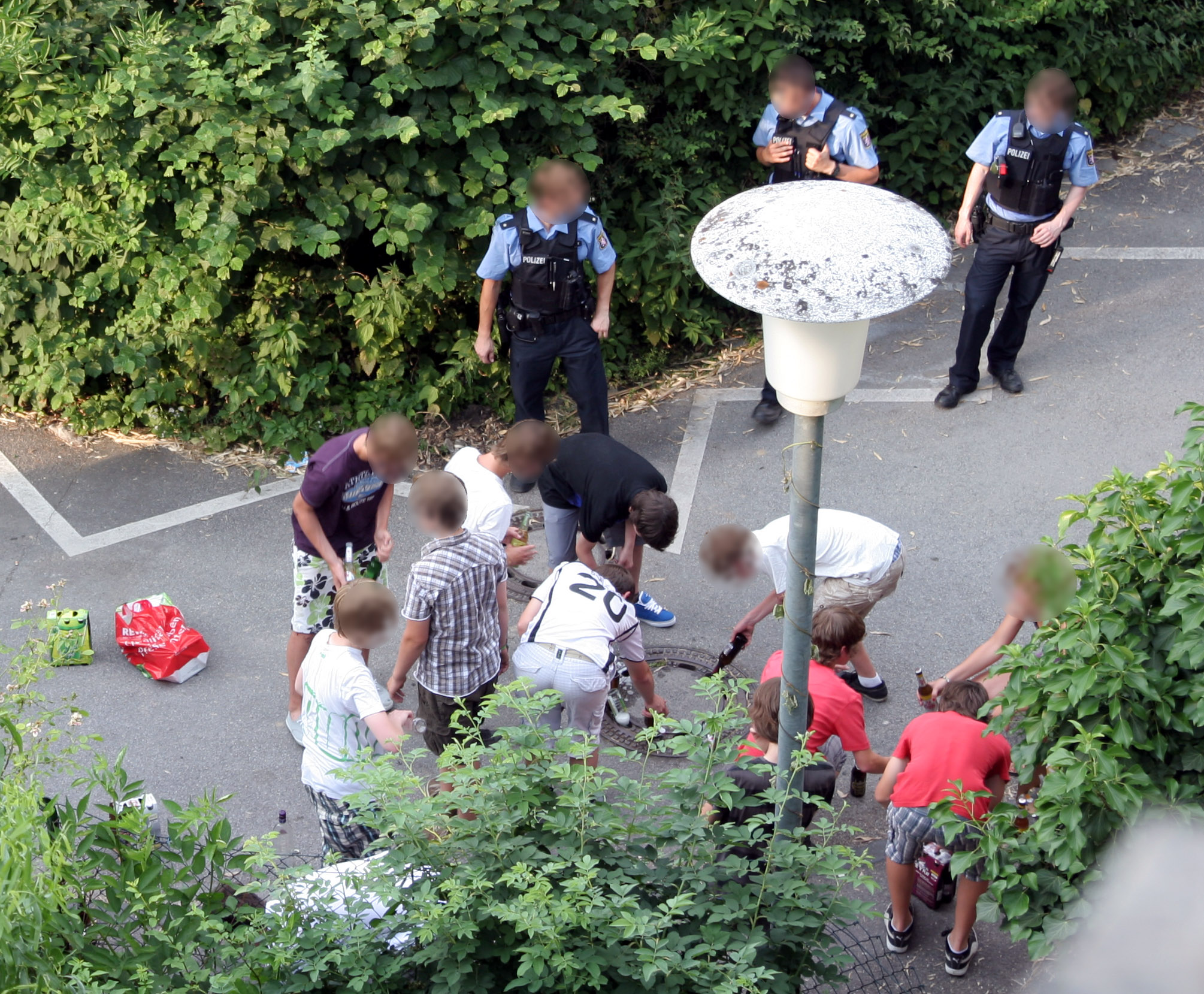 Polizeieinsatz in Bensheim (Hessen) im Rahmen des Jugendschutzgesetzes. Mehrere Jugendliche müssen hier soeben erworbene alkoholische Getränke in der Kanalisation entsorgen, da sie nicht die notwendige Altersgrenze überschritten haben.